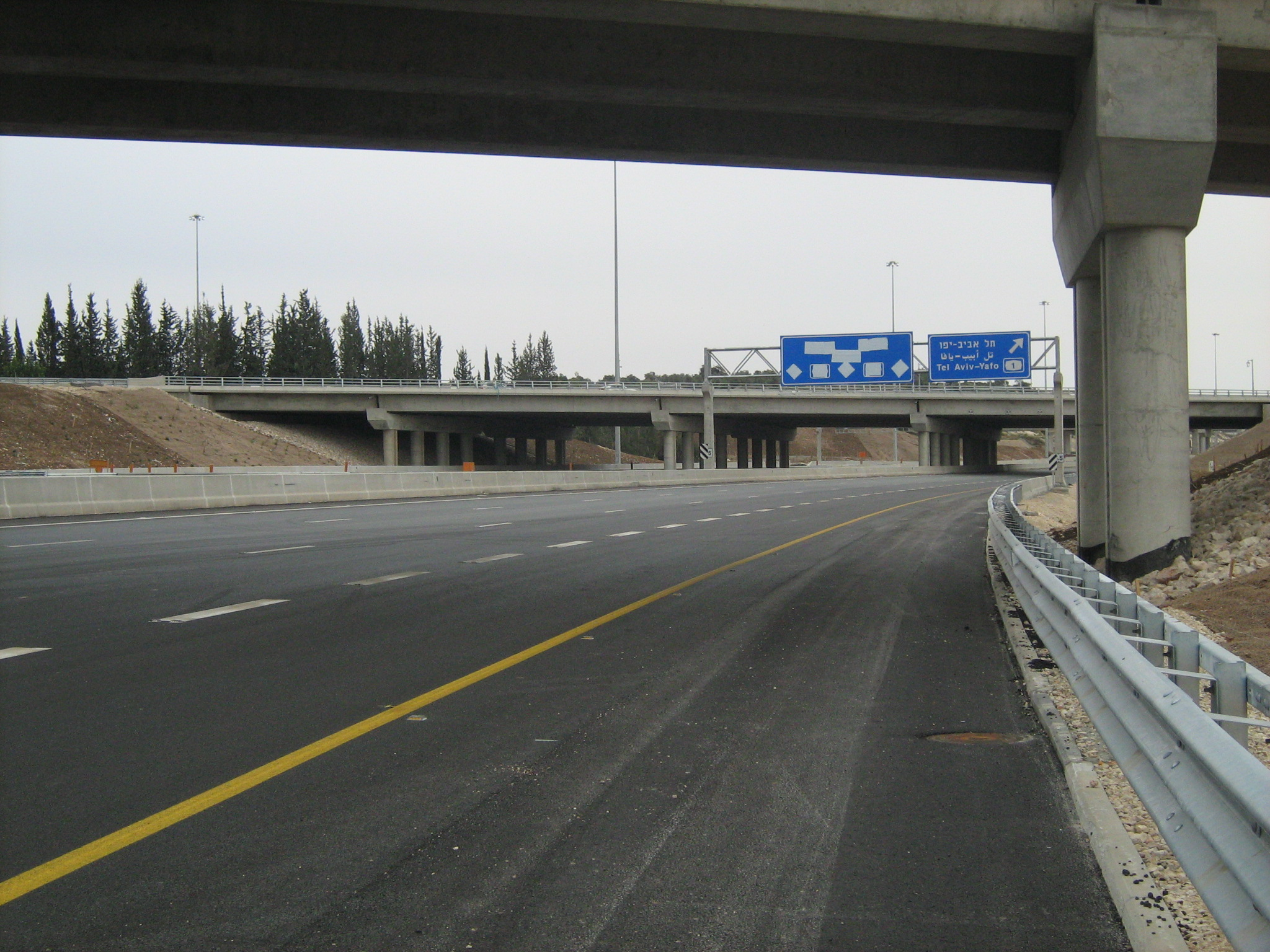 כביש 431 - מחלף ענבה